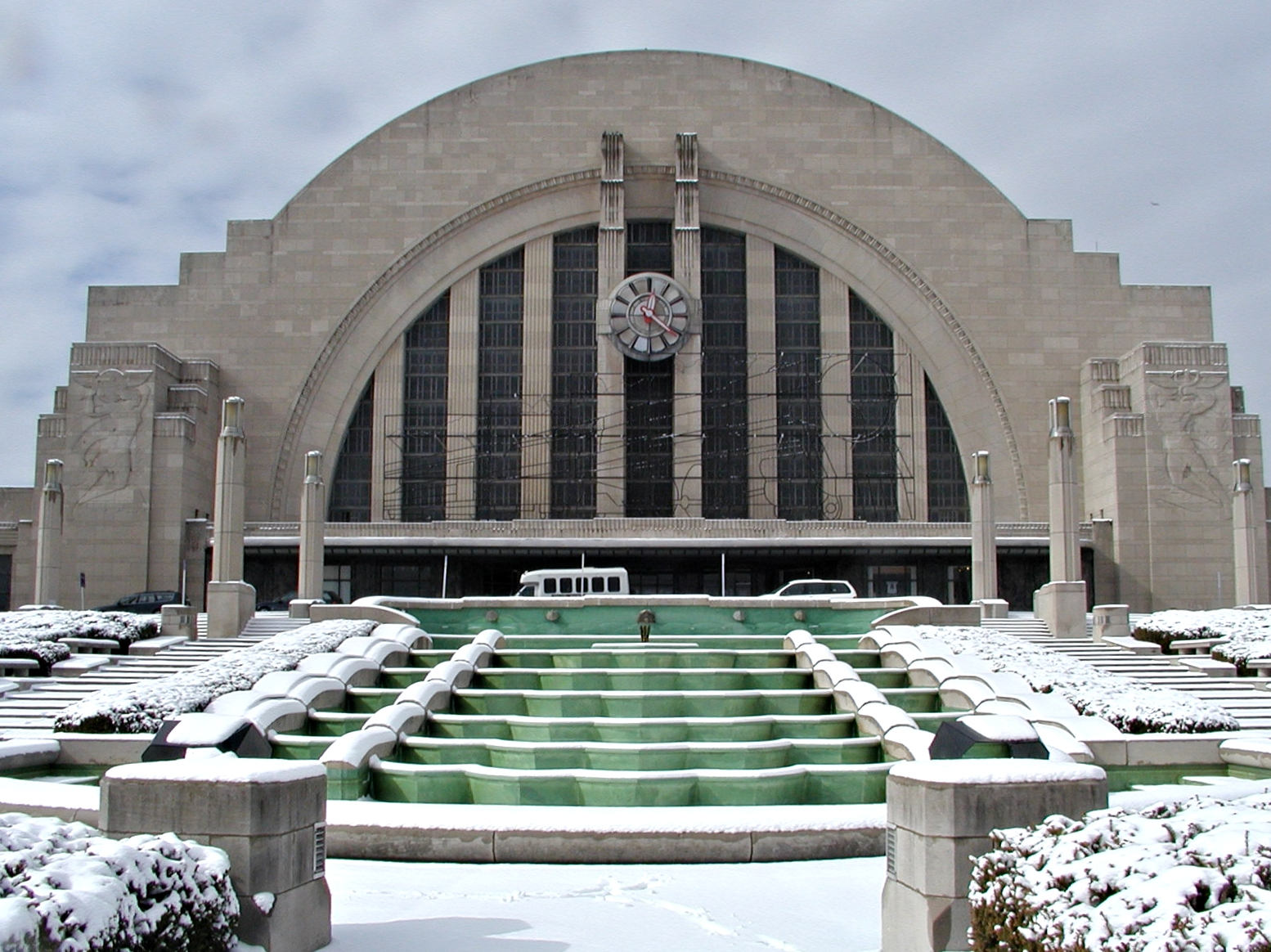 Gorsaf reilffordd Cincinnati